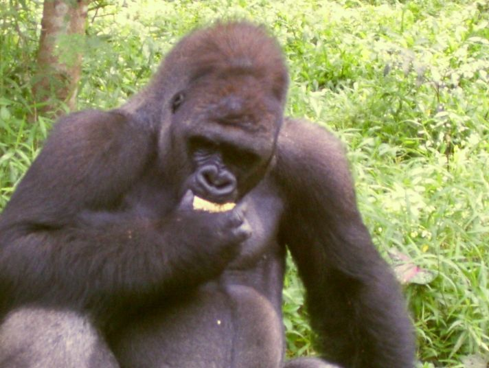 Gorilla in smutzer primate center, Ragunan, Jakarta